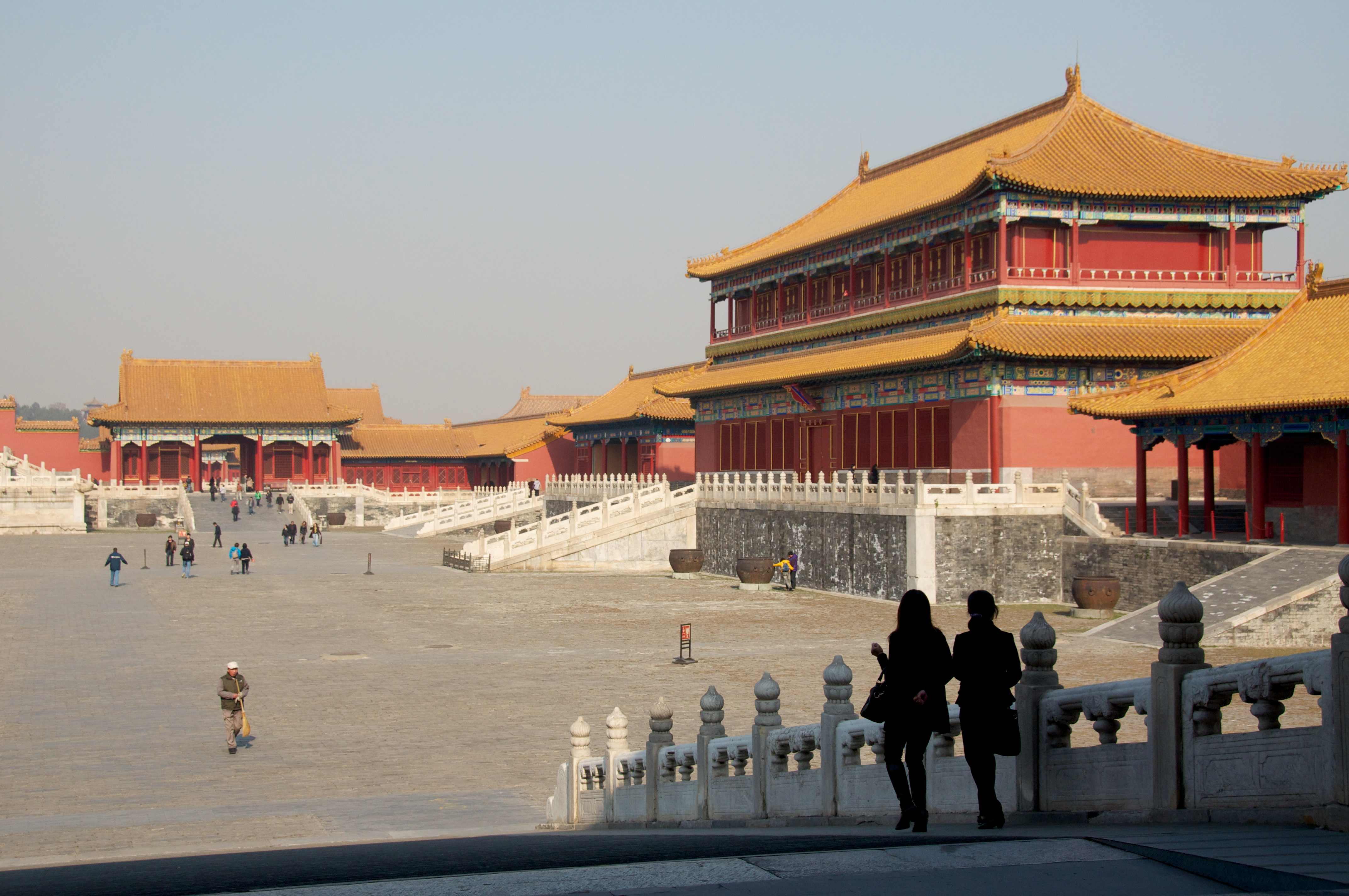 Forbidden City